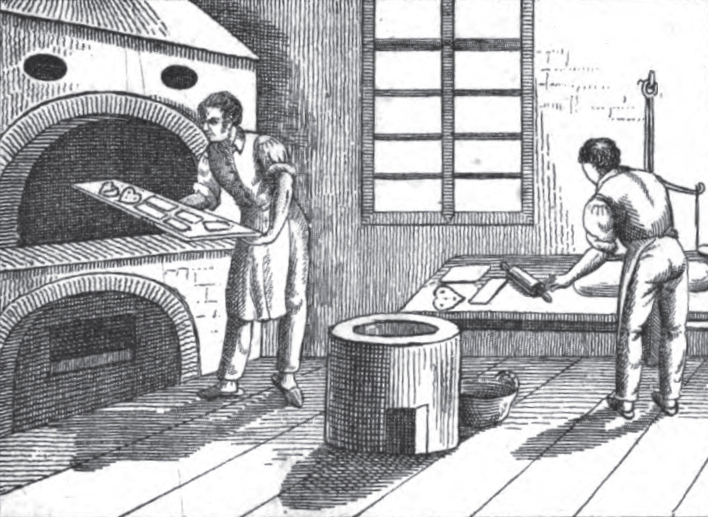 Jakob Eberhard Gailer (1792–1850): Neuer Orbis Pictus für die Jugend. Reutlingen 1832, S. 376: "Dulciarius pistor seu libarius coquendorum e farina, syrupo ac melle panum dulciaciorum, qui notissimi sunt er in deliciis habentur, artem callet – Der Lebzeltner oder Lebküchler versteht die Kunst, aus Mehl, Syrup und Honig die allgemein bekannten und beliebten Pfefferkuchen zu machen."